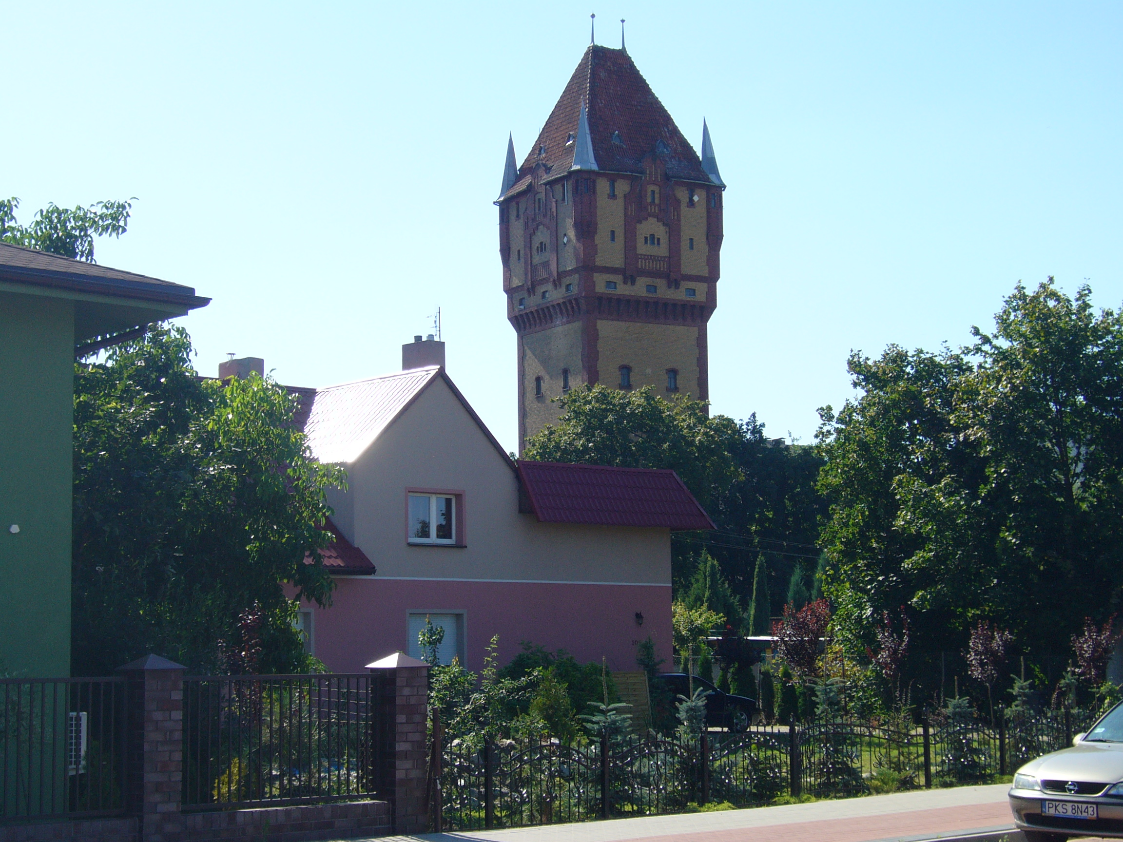 wieża cisnień w Kościanie